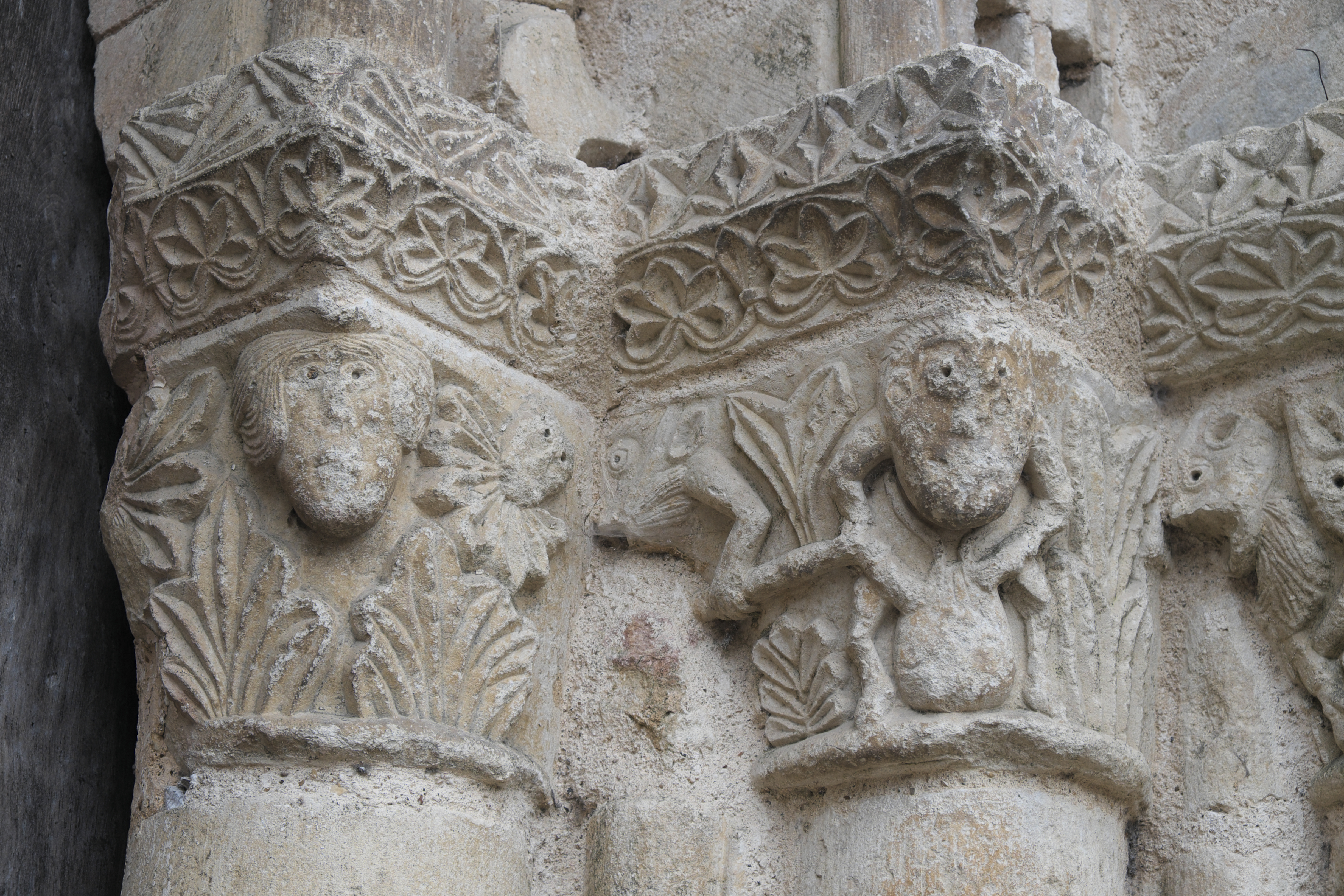 Katholische Kirche Saint-Jean-Baptiste in Jazeneuil im Département Vienne (Nouvelle-Aquitaine/Frankreich), Portal an der Westfassade, Kapitelle